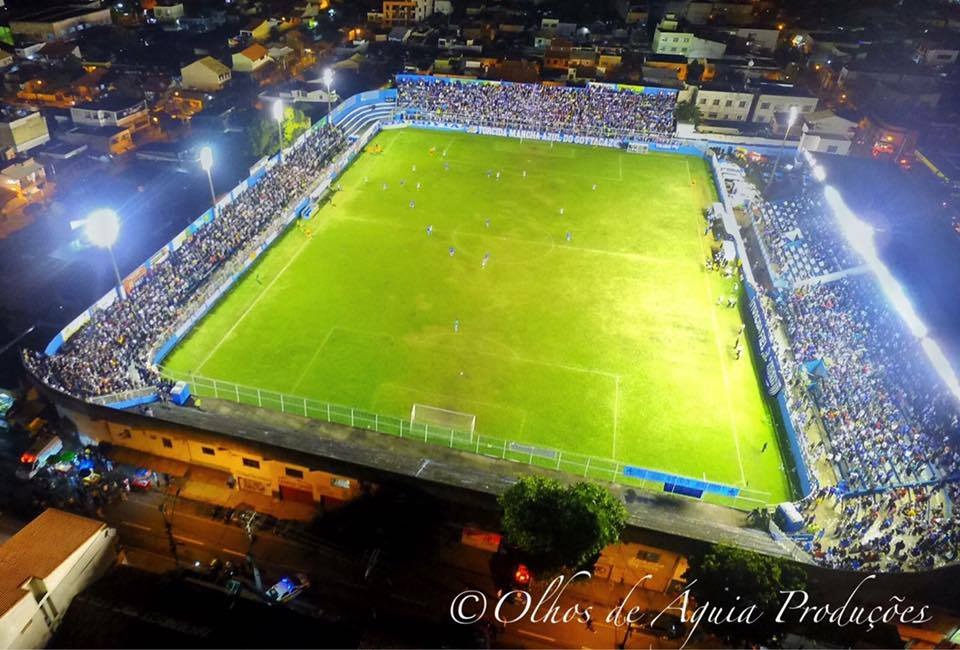 Estádio Ary de Oliveira, durante a partida Goytacaz 2 x 1 Americano em 2017